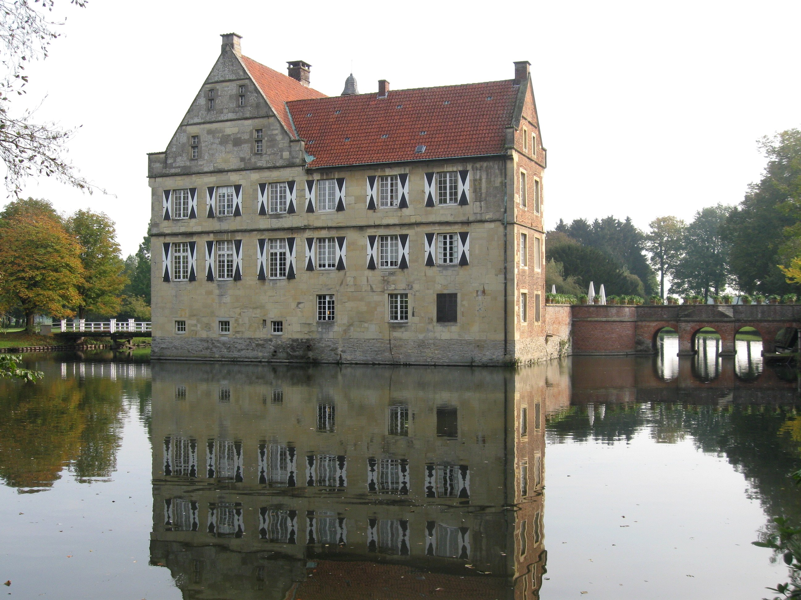 Burg Hülshoff, Havixbeck, Geburtshaus der Dichterin Annette von Droste-Hülshoff